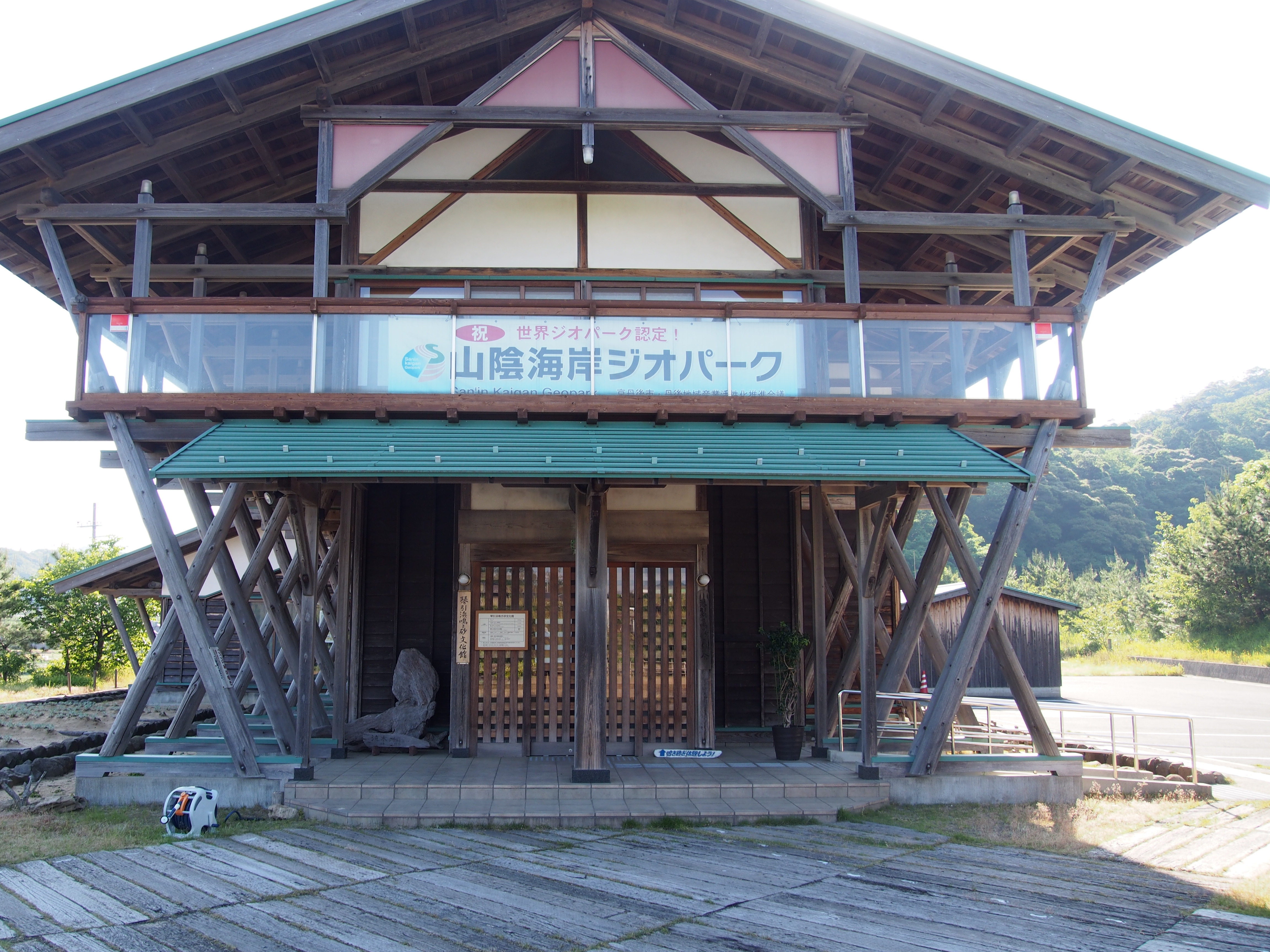 琴引浜鳴き砂文化館（玄関）